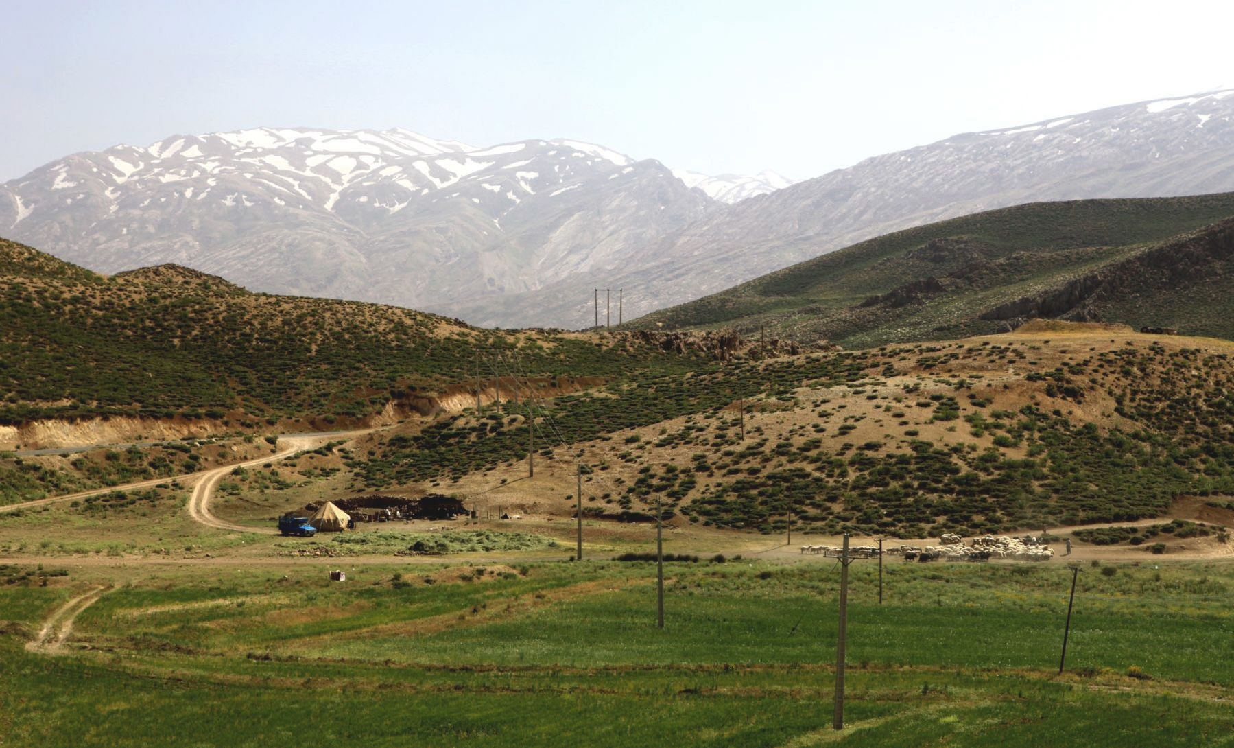 Zagros mountains, Chahar Mahal o Bakhtiari